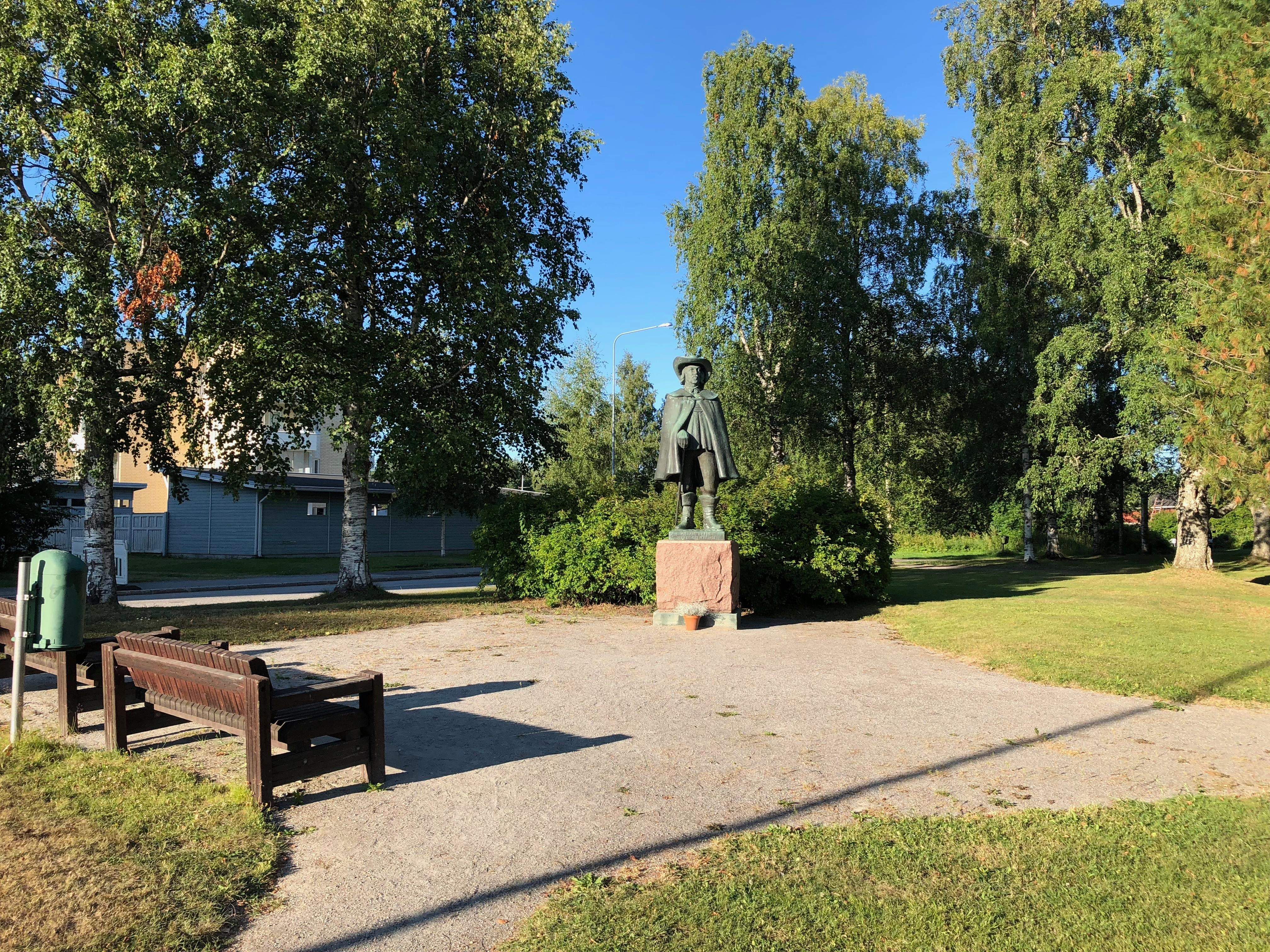 Памятник